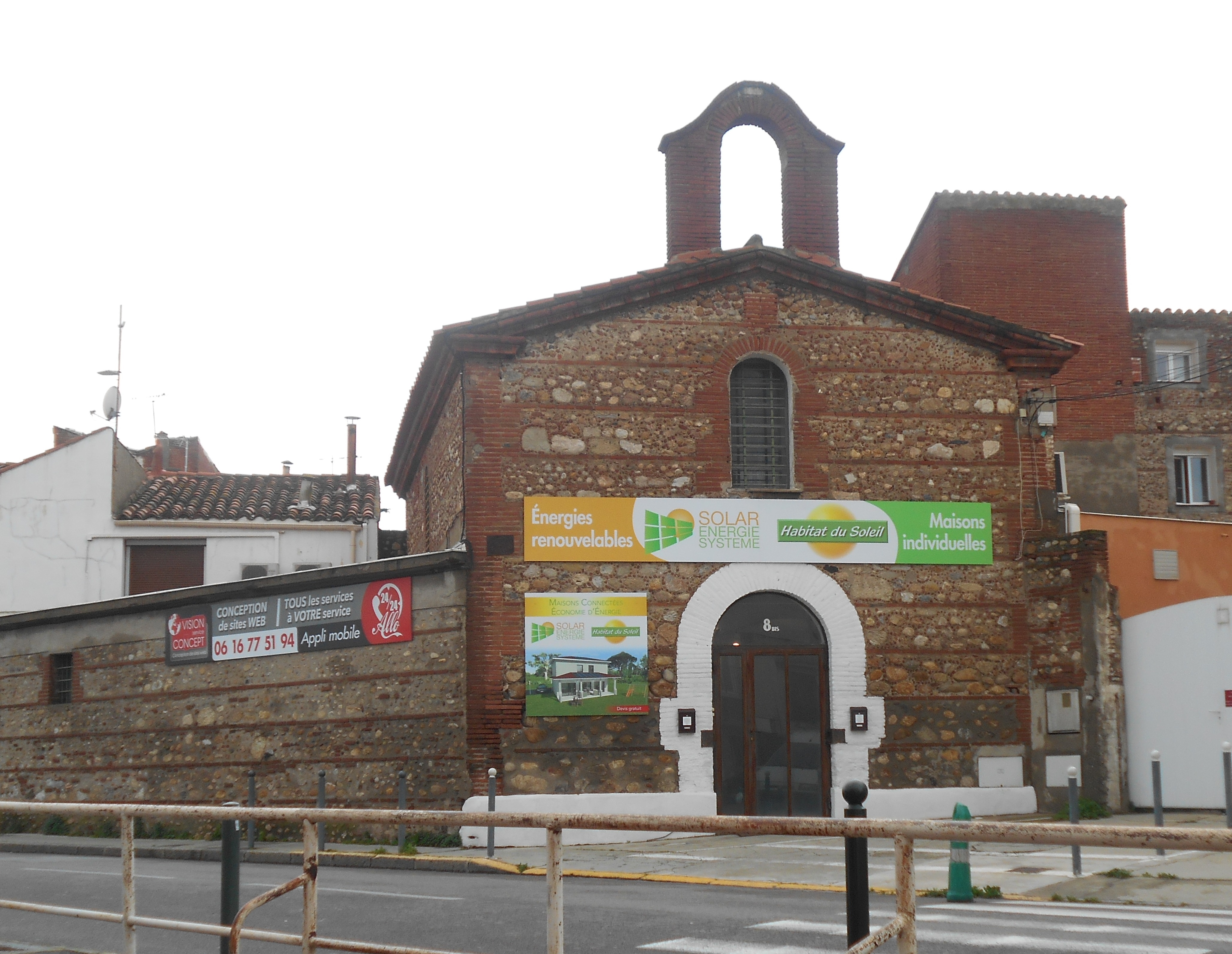 L'antiga església de Sant Galderic de Perpinyà